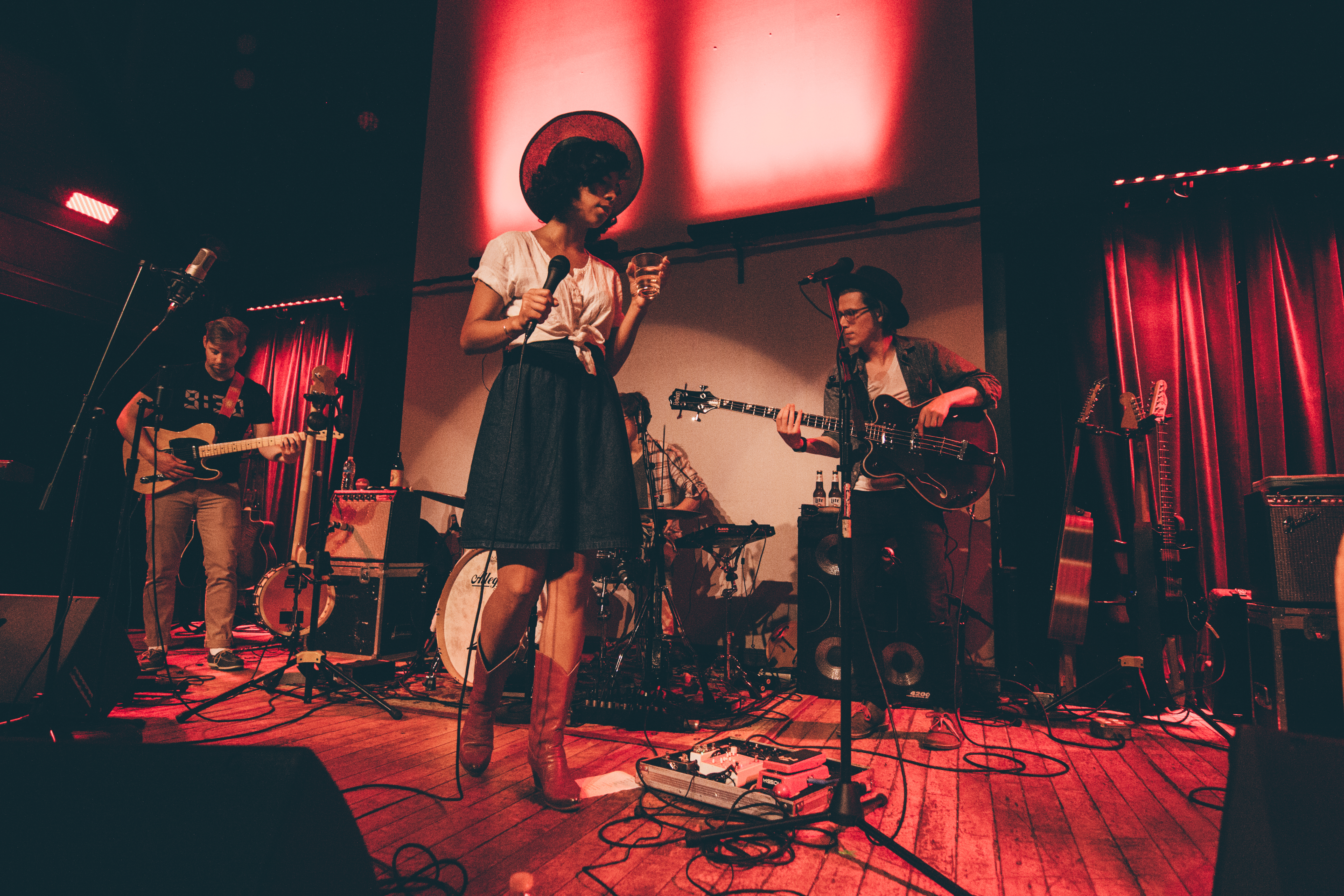 PHOX-4547